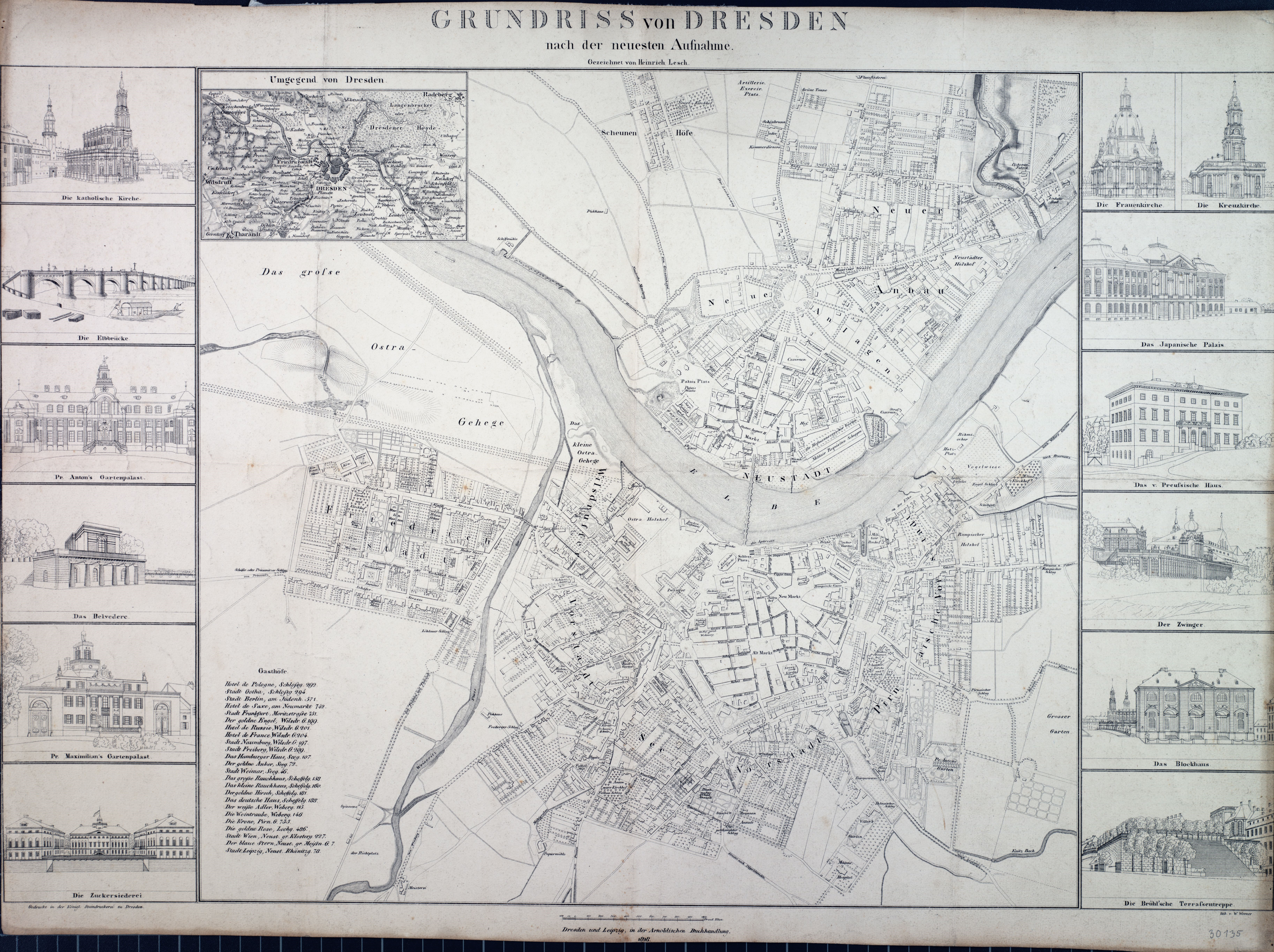 Lesch, Heinrich Grundriss von Dresden nach der neuesten Aufnahme, 1:9 000, Lithographie, 1828